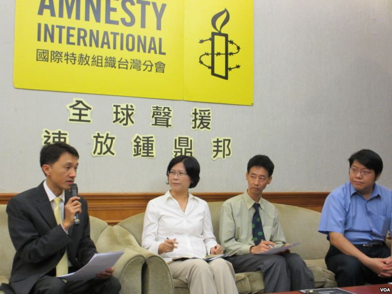 大赦国际声援台湾法轮功人士钟鼎邦